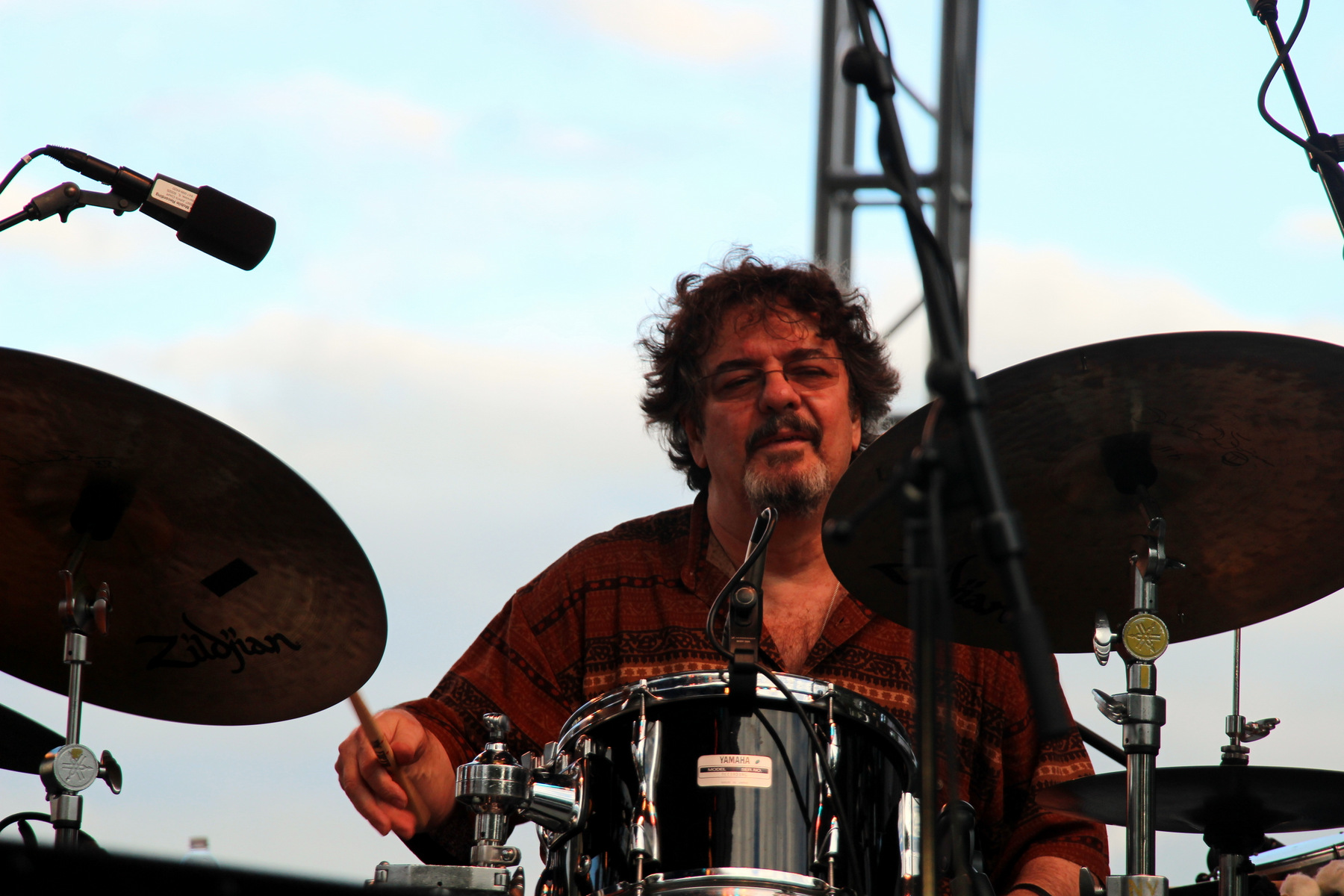 Trio Da Paz: Duduka Da Fonseca - Drums